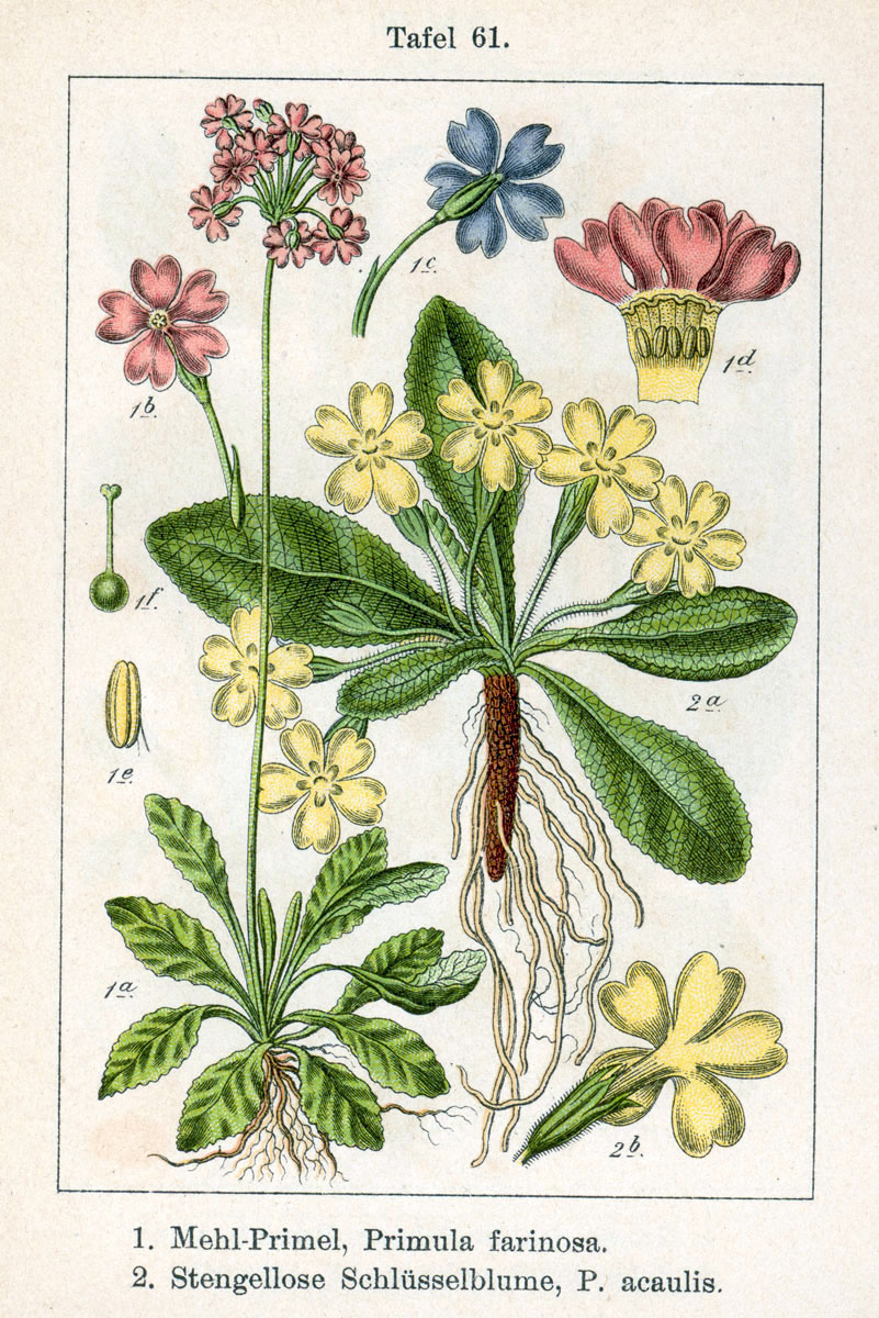 1. Primula farinosa L. 2. Primula vulgaris Huds., syn. Primula acaulis (L.) Hill Original Description 1. Mehl-Primel, Primula farinosa 2. Stengellose Schlüsselblume, Primula acaulis